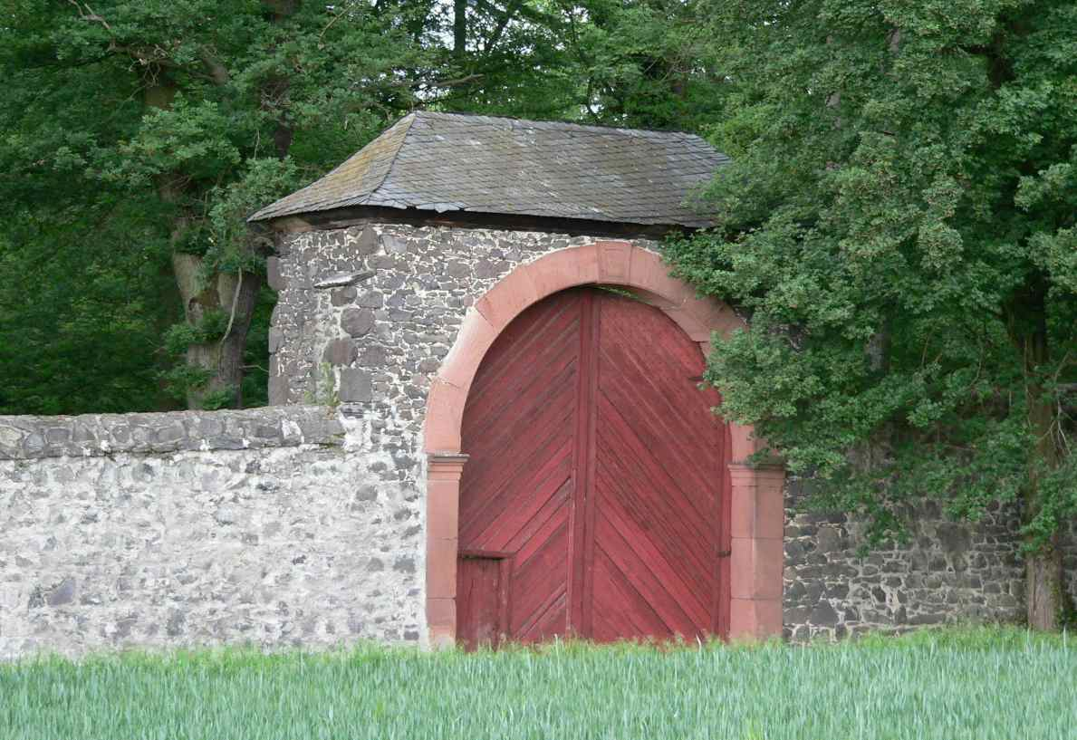 Rotes Tor im Kloster Arnsburg bei Lich, Hessen, Germany